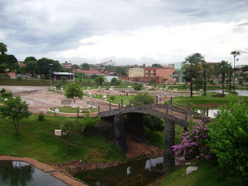 Cartão Postal da Cidade